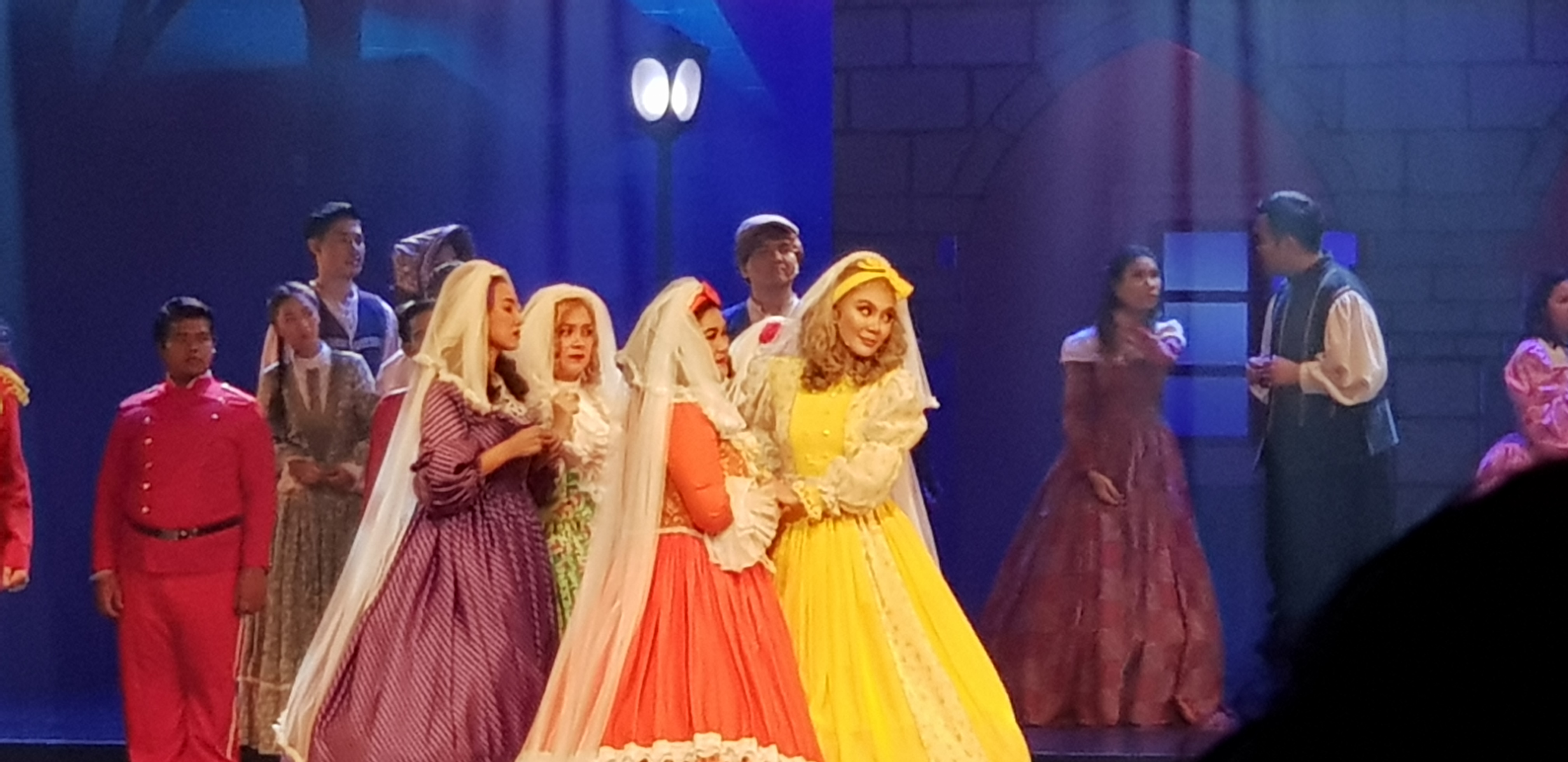 ภาพจากละครเวทีเรื่อง หนามยอกเอาหนามบ่ง บทพระราชนิพนธ์ในพระบาทสมเด็จพระมงกุฎเกล้าเจ้าอยู่หัว แสดง ณ โรงละครแห่งชาติ วันที่ 24 มีนาคม 2561